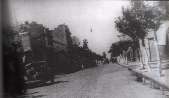 Calle Alvear, Villa Ballester, en 1944.